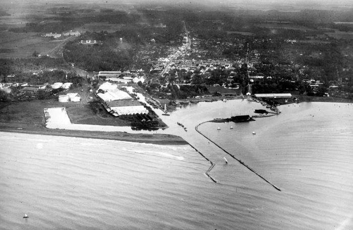 Repronegatief. De haven van Tegal, Midden-Java